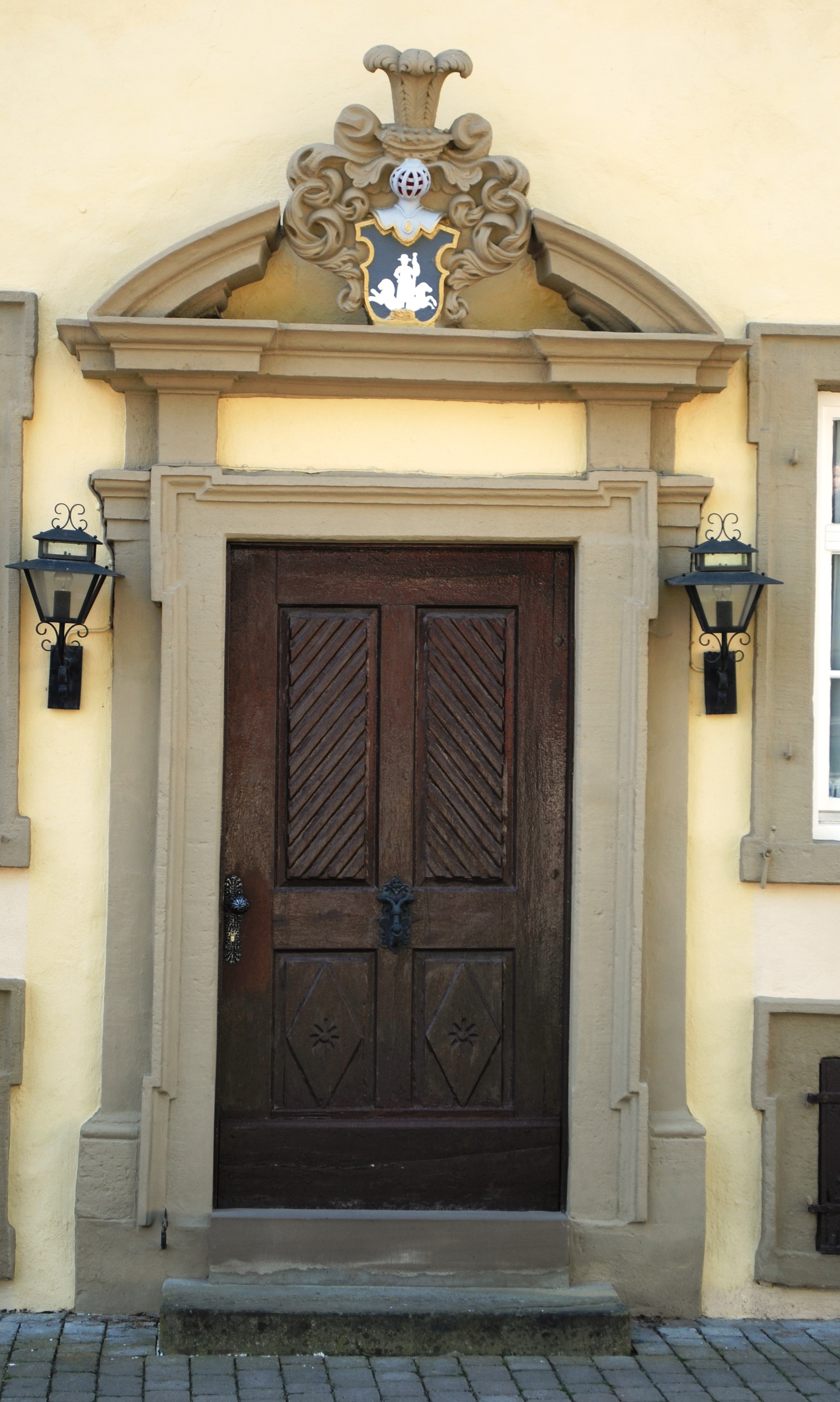 Schloss Schernau (auch Kleiner Adelspalais), Schlossstraße Schernau (Dettelbach).